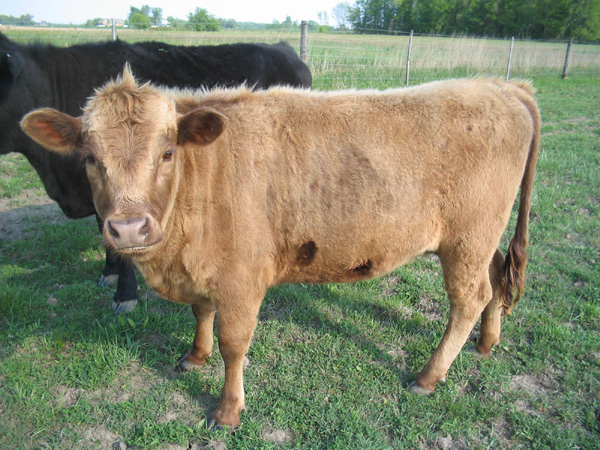 Red Dexter heifer.